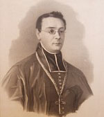 Bisschop Blum (1808-1884) - bisschop van het Duitse Limburg - Duitsland